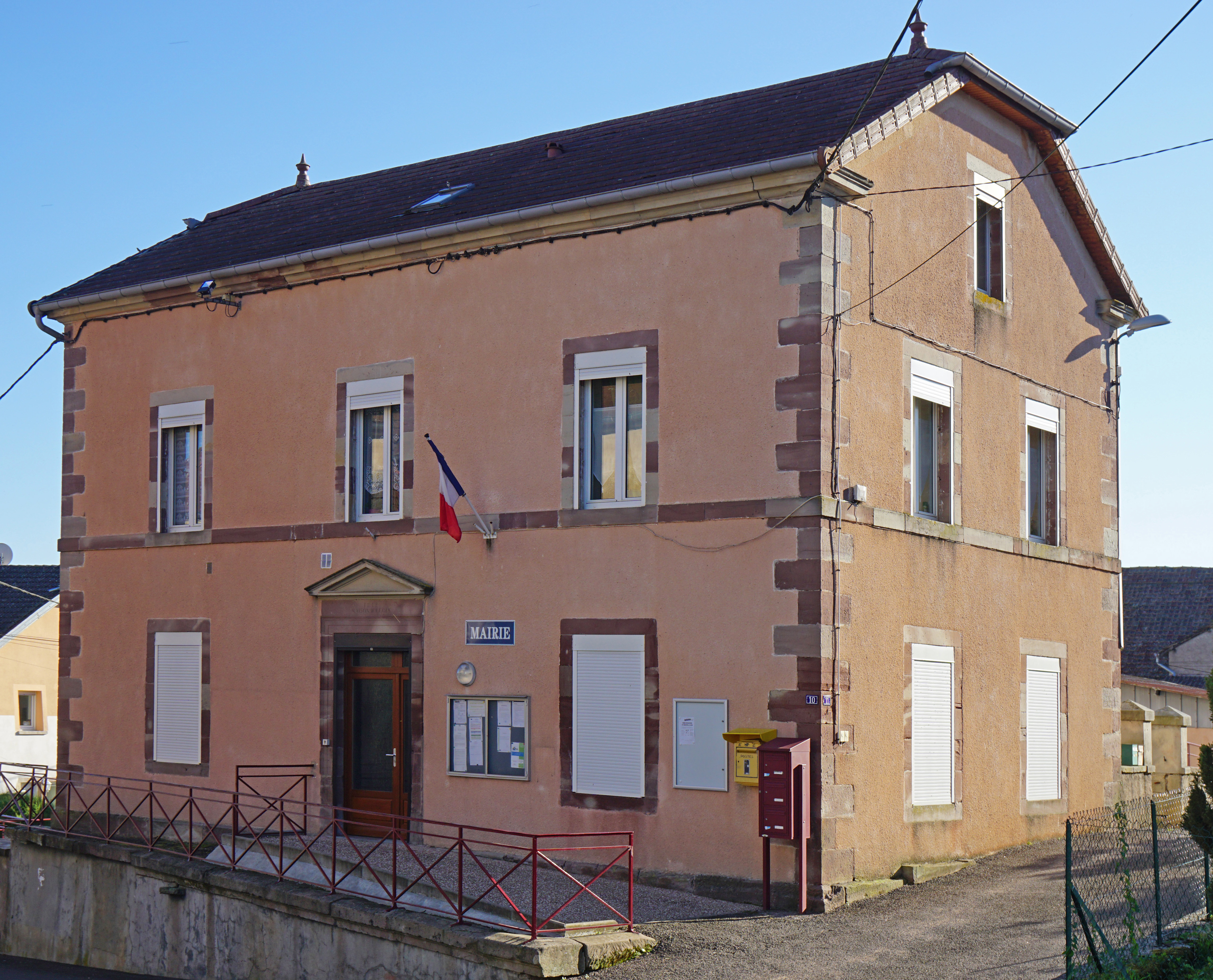 La mairie d'Ailloncourt.